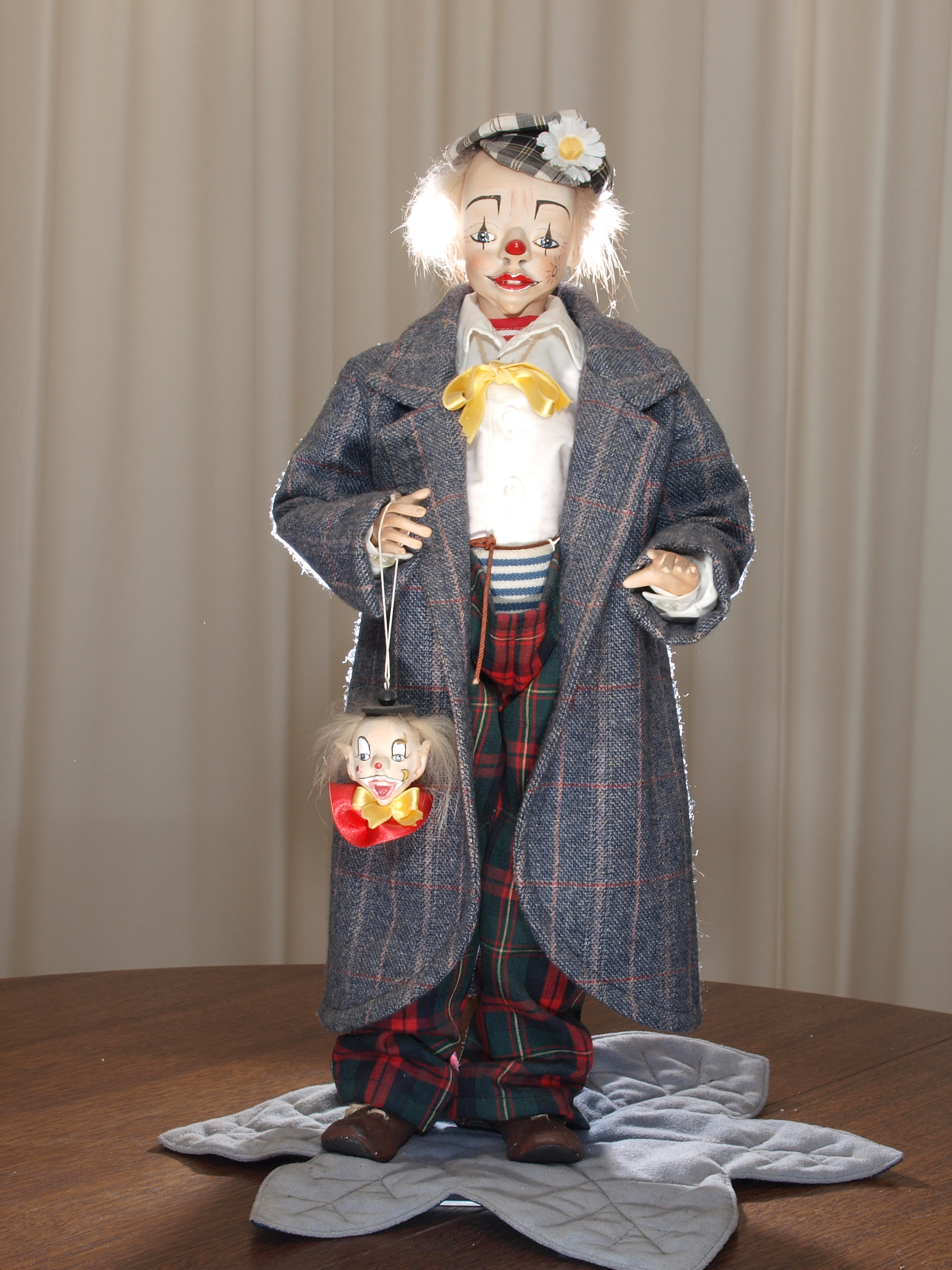 Clown doll by Baukje de Vries